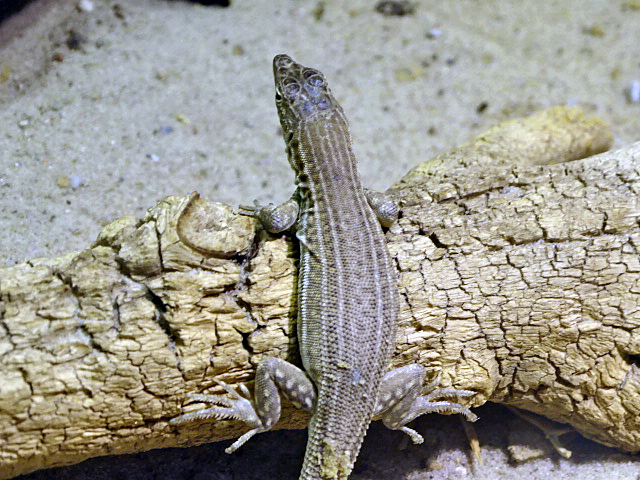 Bosc's fringe-toed lizard (Acanthodactylus boskianus), Zoo Berlin Aquarium - 10 August 2017